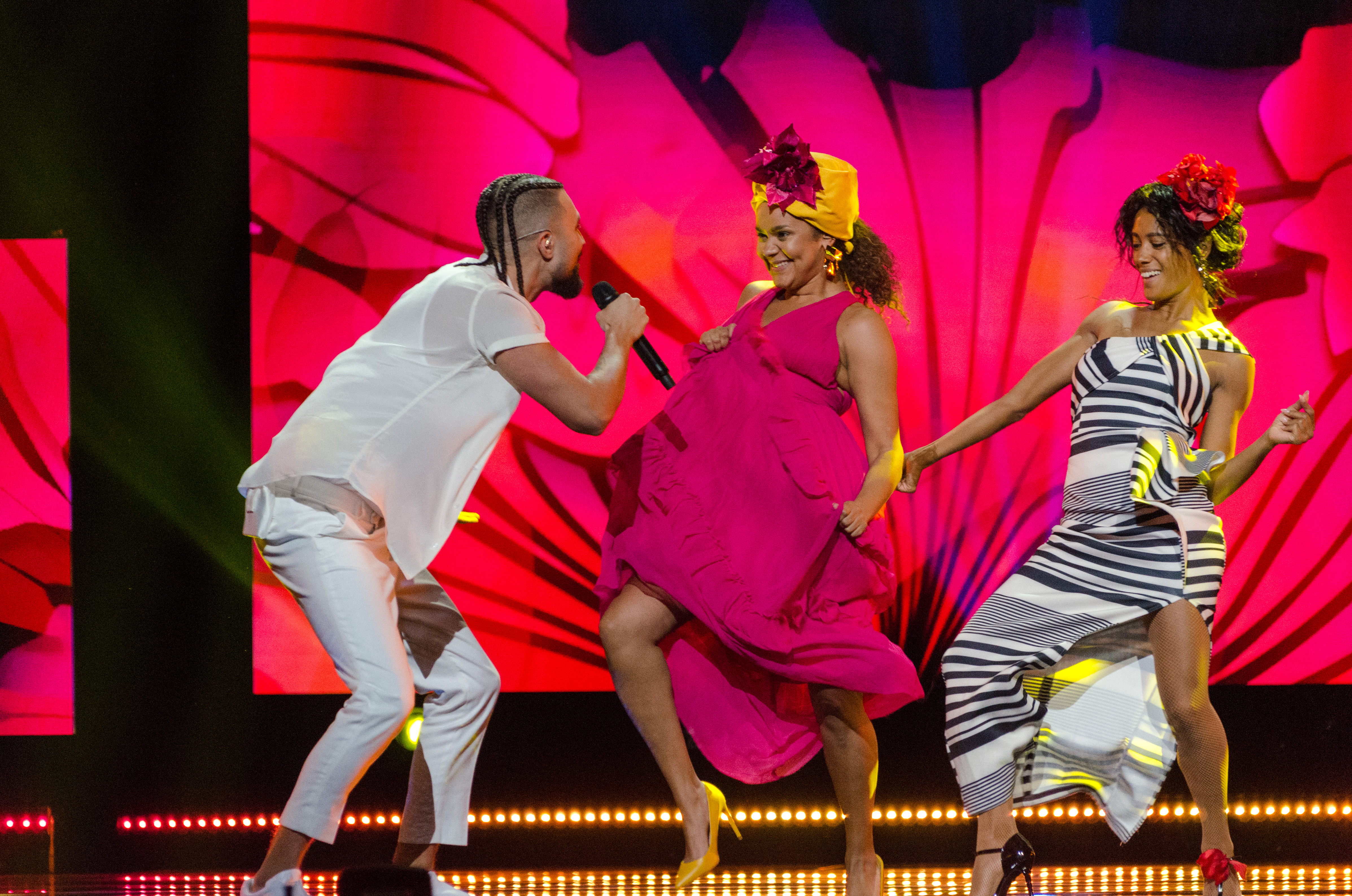 Moncho under det andra publika genrepet i Malmö.